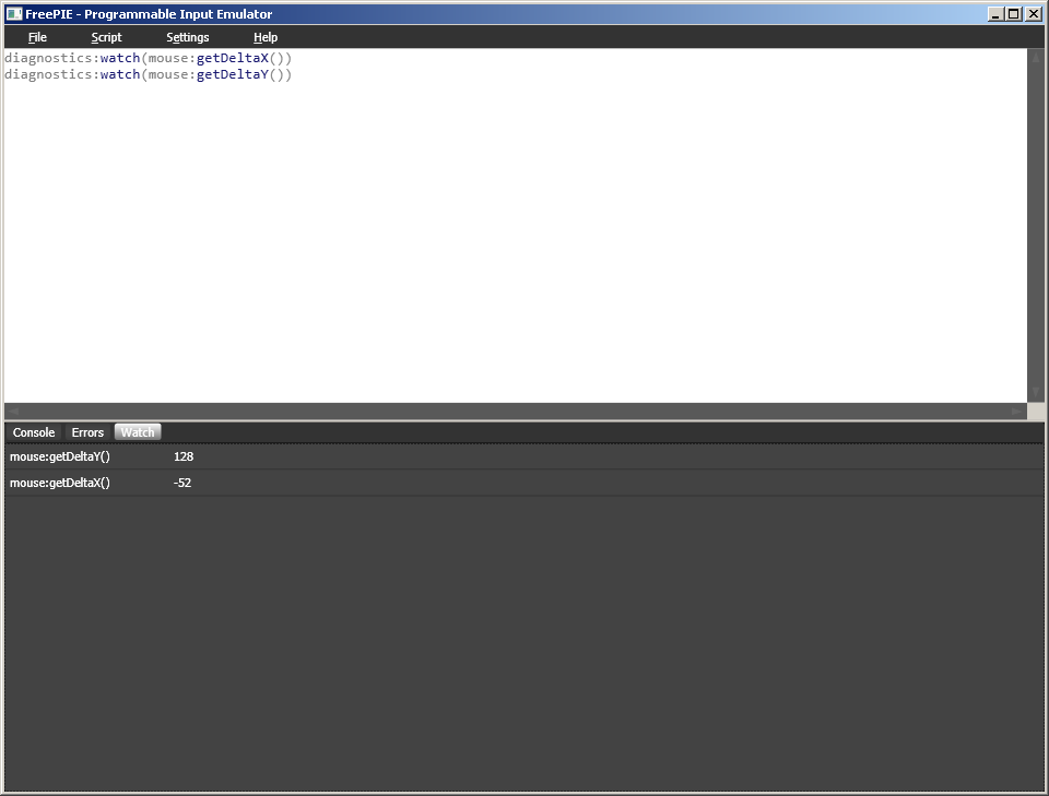 Ett exempel på FreePIEs IDE